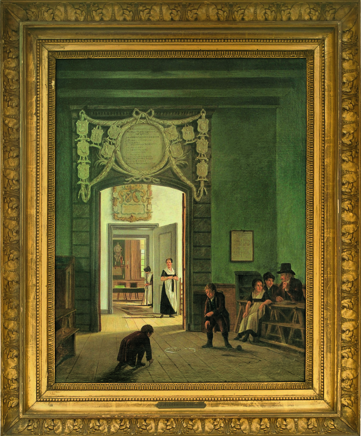 J.Jelgershuis, olieverf op doek. Interieur regentenkamer ELOMVH